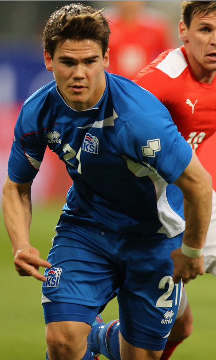 Viðar Örn Kjartansson